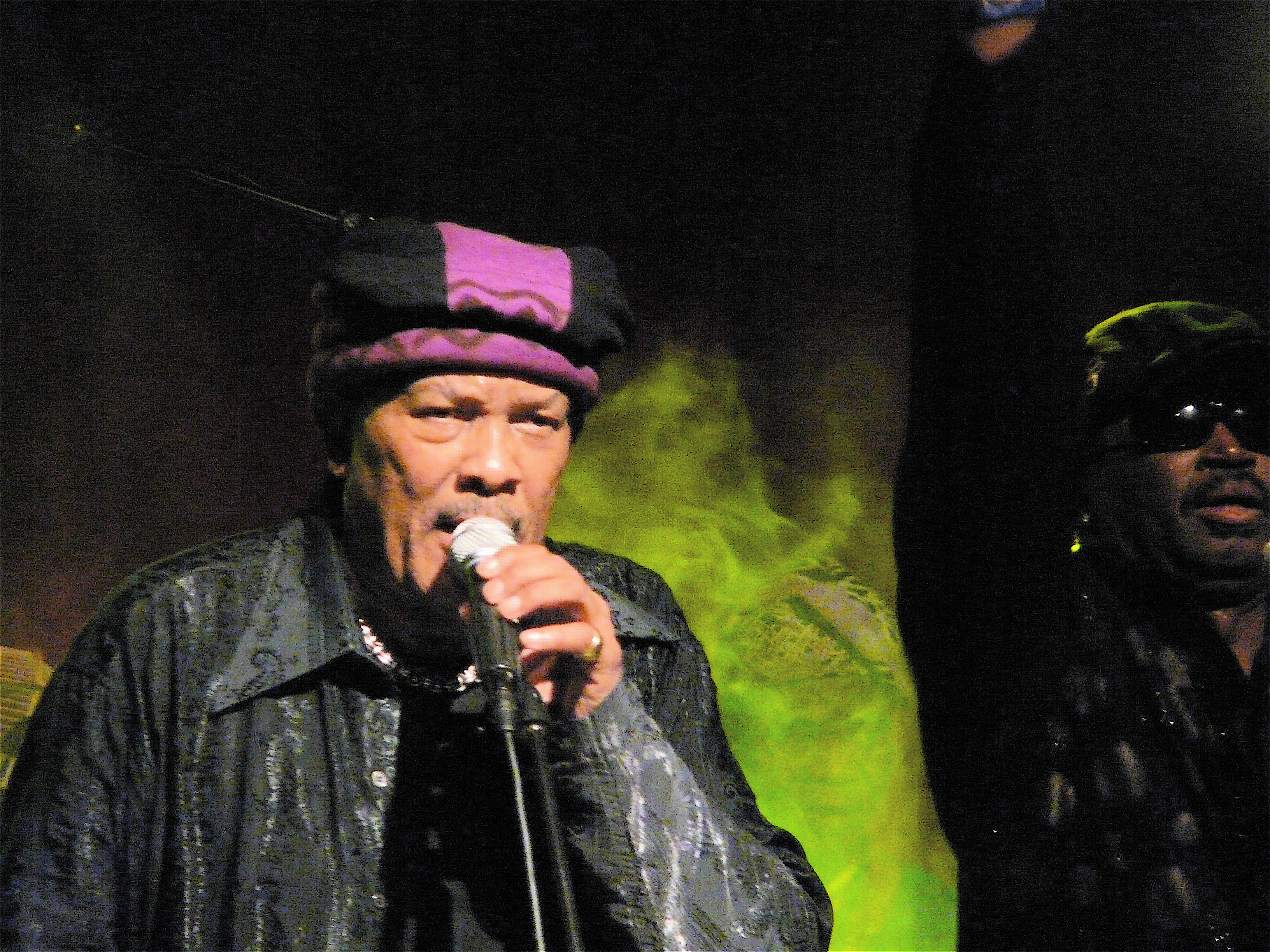 Roy Ayers, artiste américain, en concert au Cabaret Sauvage à Paris, le 22 juillet 2009.